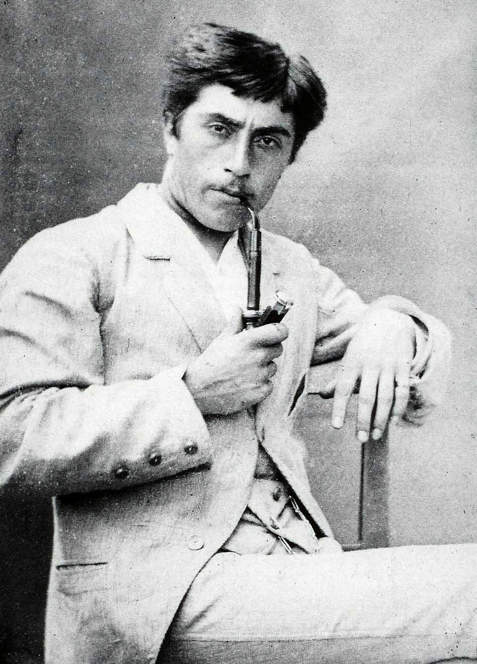 Roberto Guastalla (1855-1912), pittore parmigiano